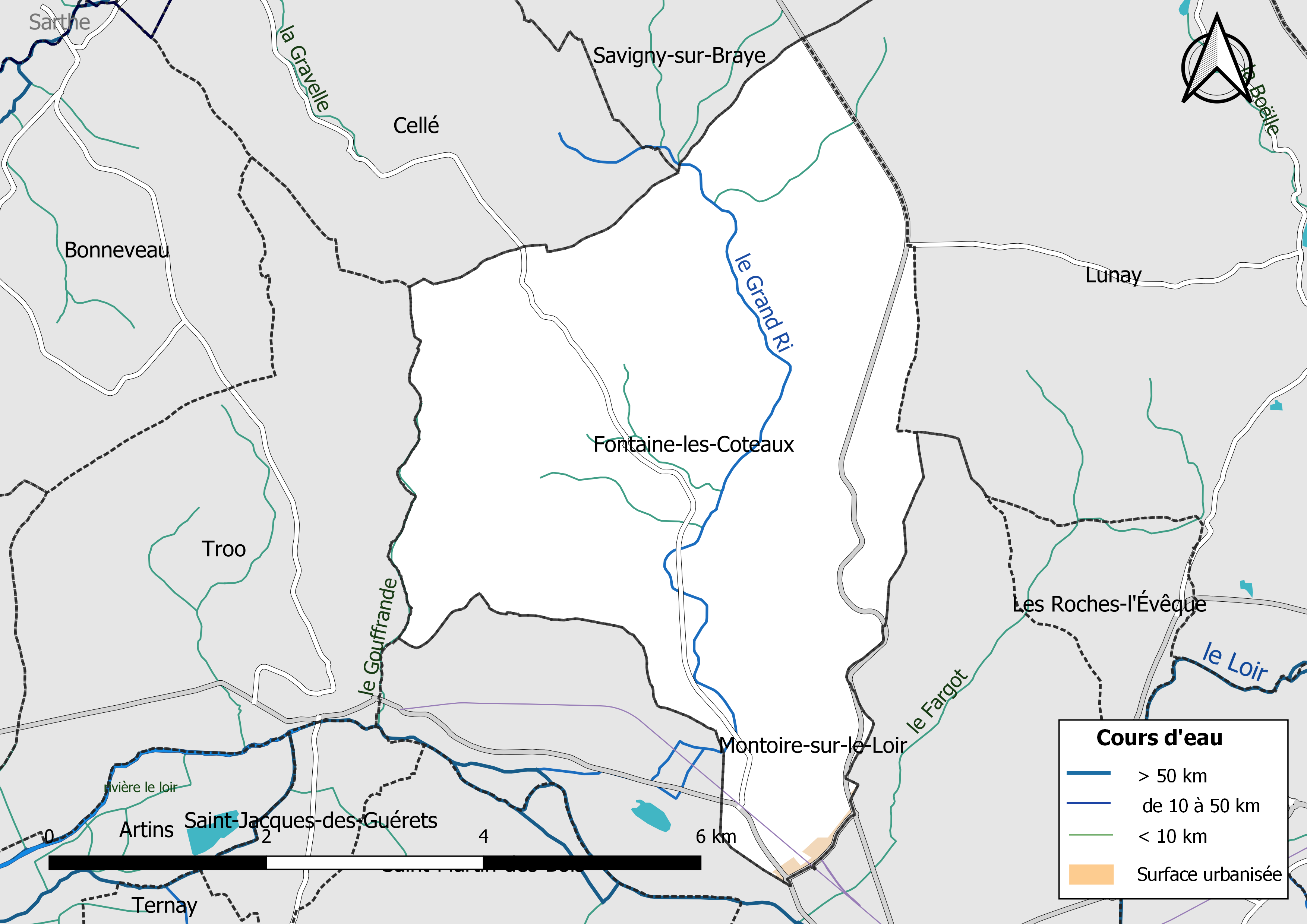 Carte du réseau hydrographique de la commune de Fontaine-les-Coteaux (Loir-et-Cher, France).